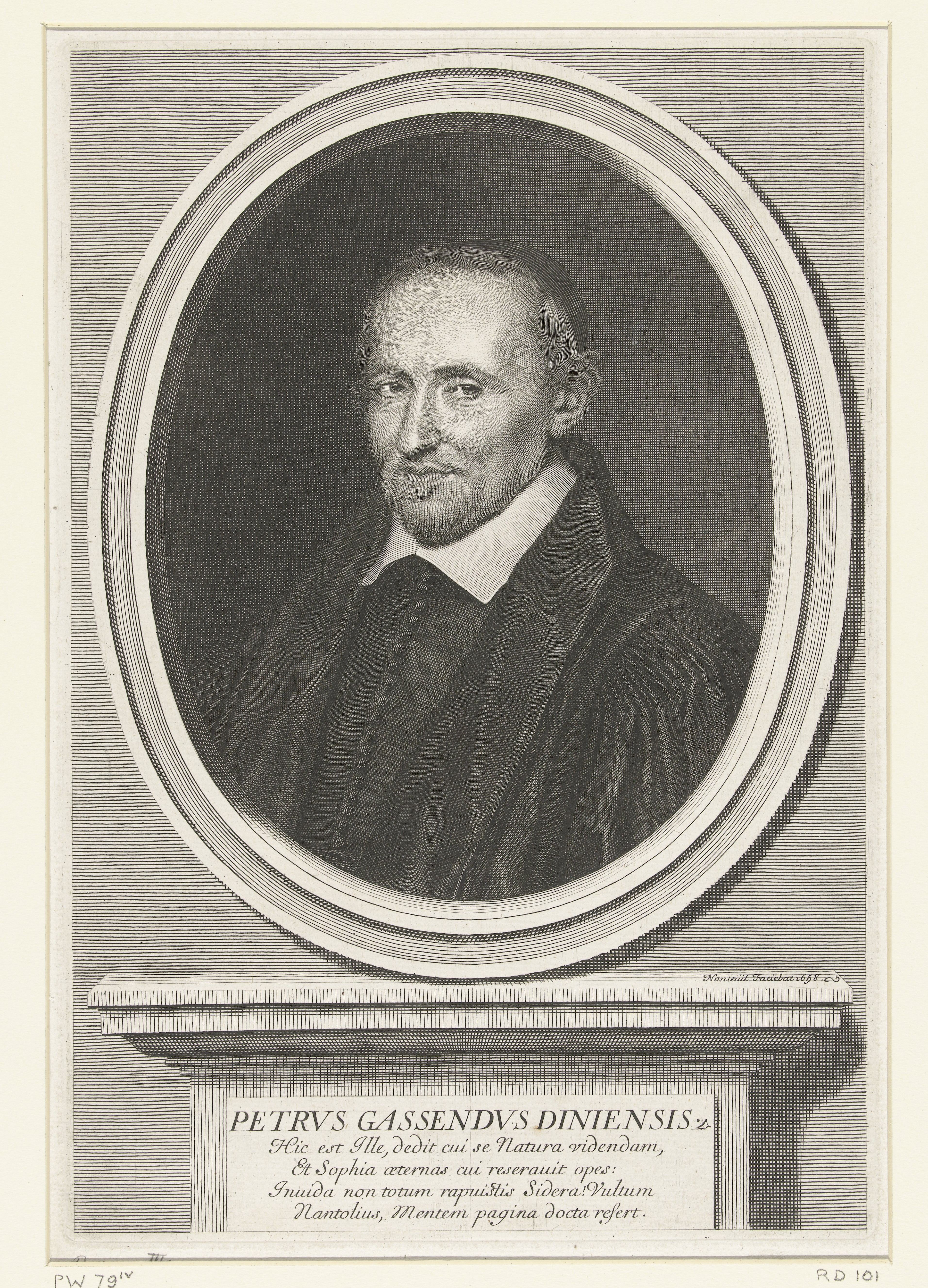 IdentificatieTitel(s): Portret van Pierre GassendiPetrus Gassendus Diniensis (titel op object)Objecttype: prent Objectnummer: RP-P-1909-1185Catalogusreferentie: Robert-Dumesnil 101Petitjean & Wickert 79-4(5)Opschriften / Merken: verzamelaarsmerk, verso midden, gestempeld: Lugt 2228Omschrijving: Portret van Pierre Gassendi, in een ovale omlijsting staand op een piëdestal met daarop een vijfregelige tekst in het Latijn.VervaardigingVervaardiger: prentmaker: Robert Nanteuil (vermeld op object)naar eigen ontwerp van: Robert NanteuilPlaats vervaardiging: FrankrijkDatering: 1658Fysieke kenmerken: gravureMateriaal: papier Techniek: graveren (drukprocedé)Afmetingen: plaatrand: h 288 mm × b 195 mmOnderwerpWie: Pierre GassendiVerwerving en rechtenVerwerving: aankoop 1909Copyright: Publiek domein